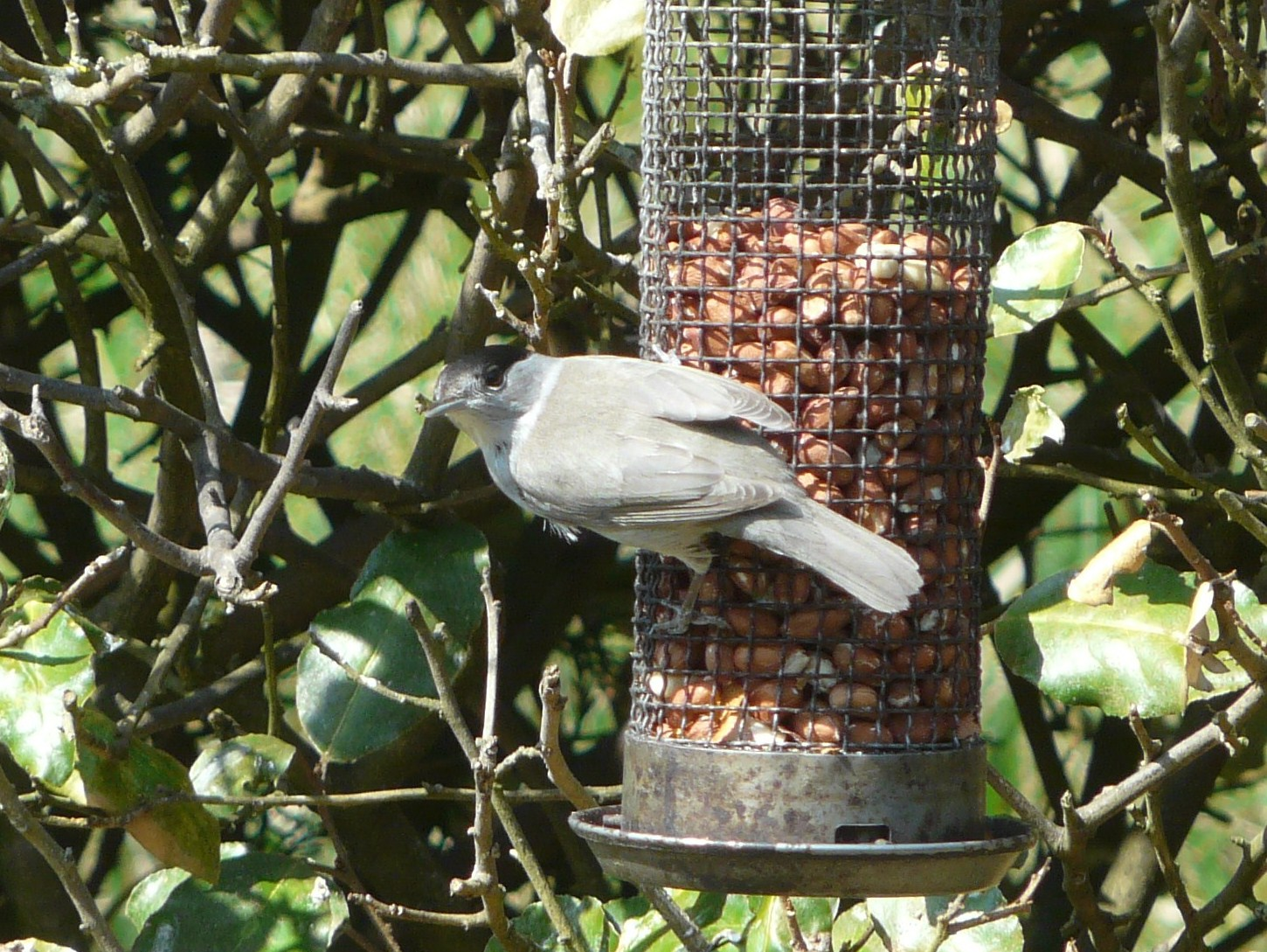 Fauvette à tête noire (Sylvia atricapilla) mâle sur un distributeur de cacahuètes, Périgueux, Dordogne, France.